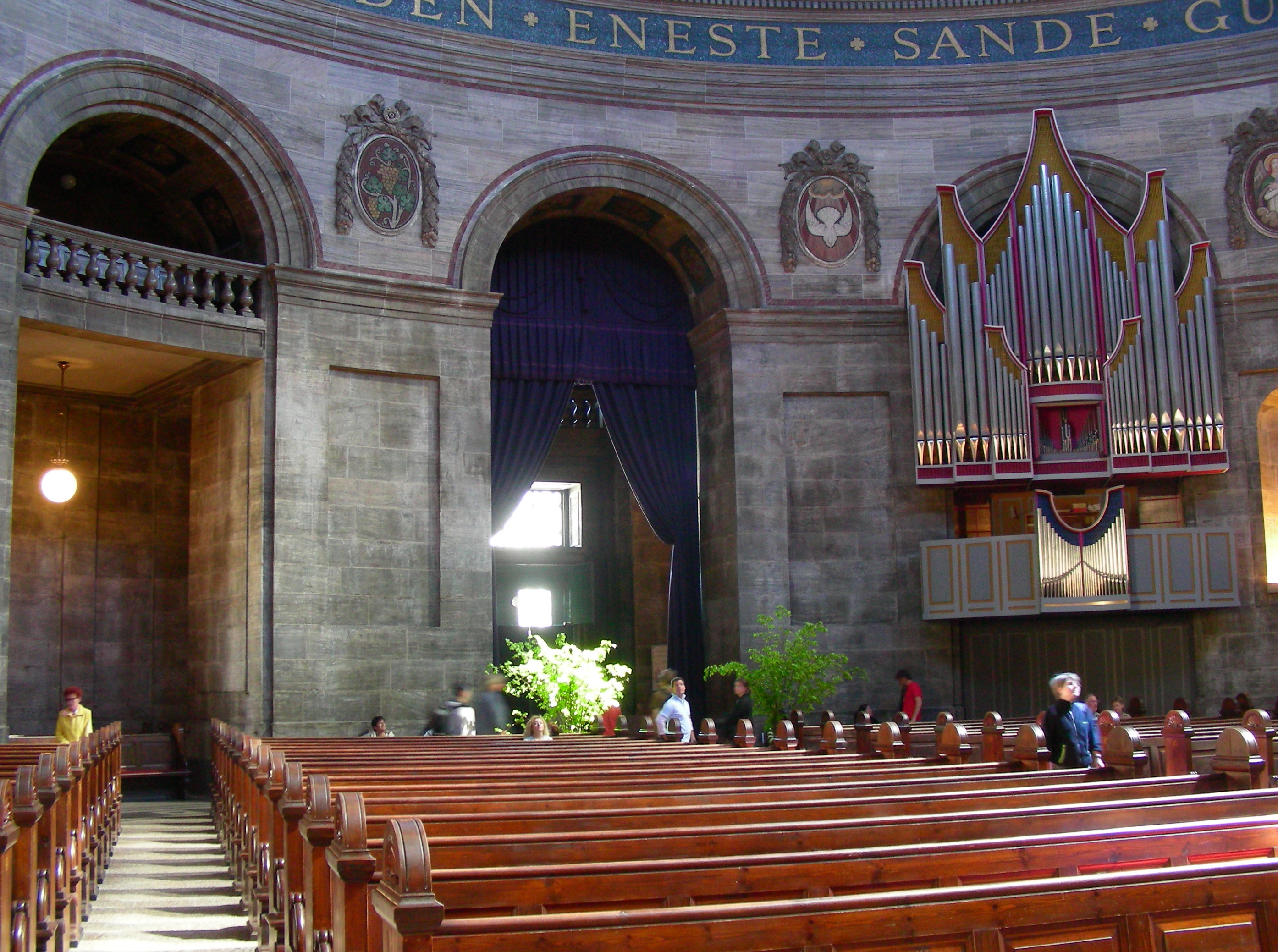 Marmorkirken, Copenhagen, Denmark. Interior. Main entrance.